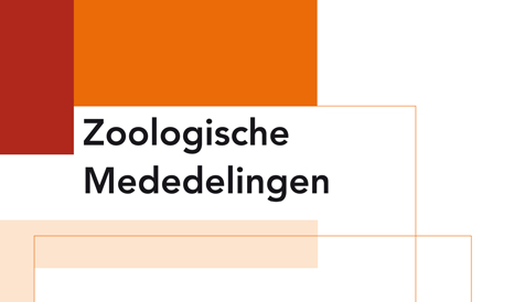 Logo of Zoologische Mededelingen